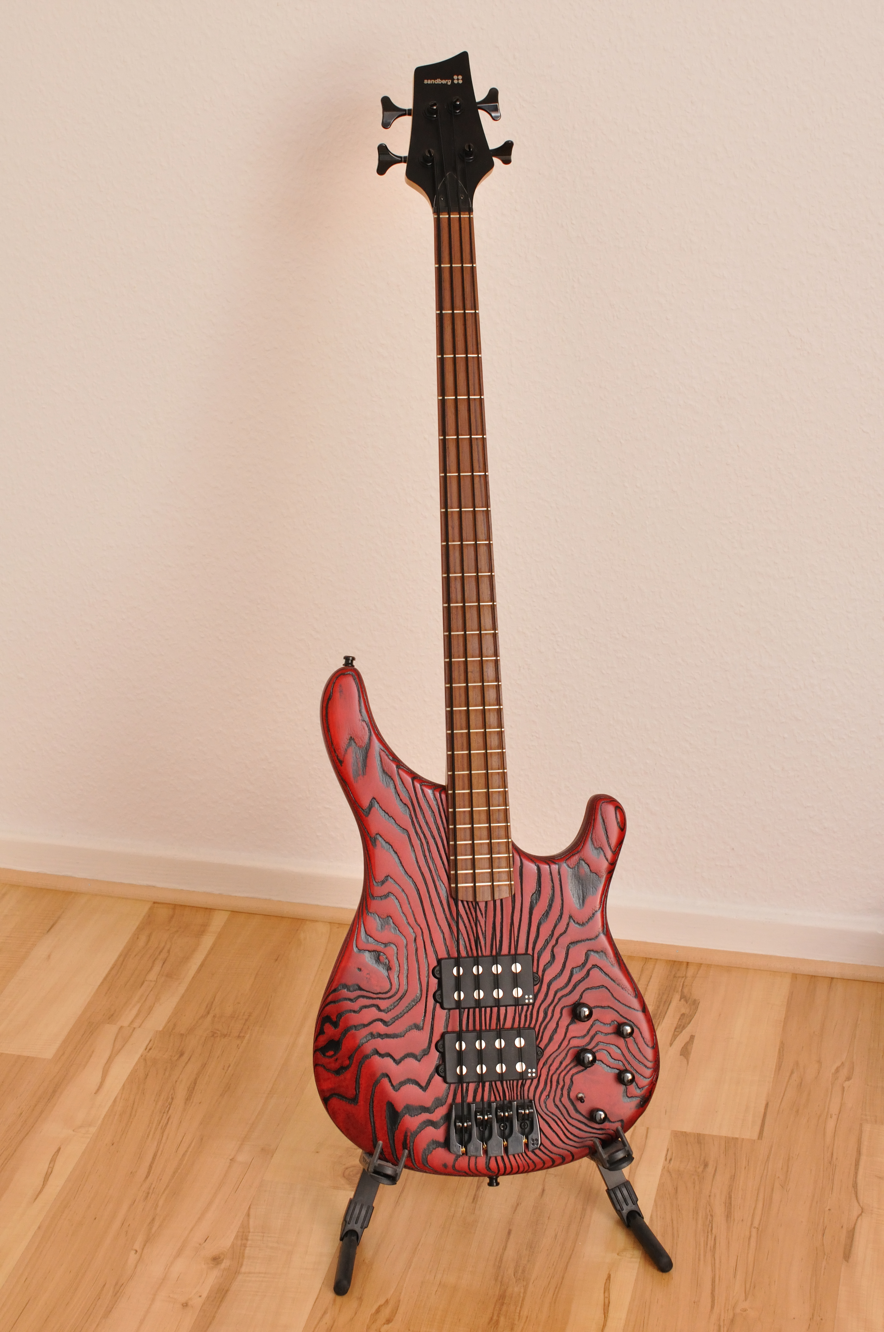 E-Bass der Marke Sandberg. Model Basic. Signature Model von KenTaylor.